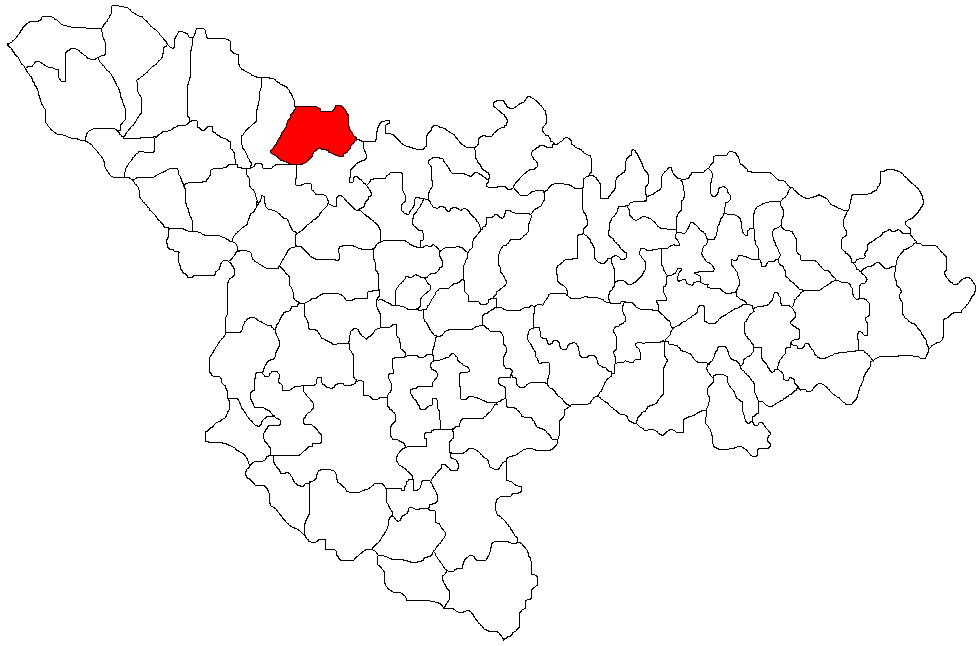 Varias, judetul Timis Licensing Categorie:Hărţi ale judeţului Timiş